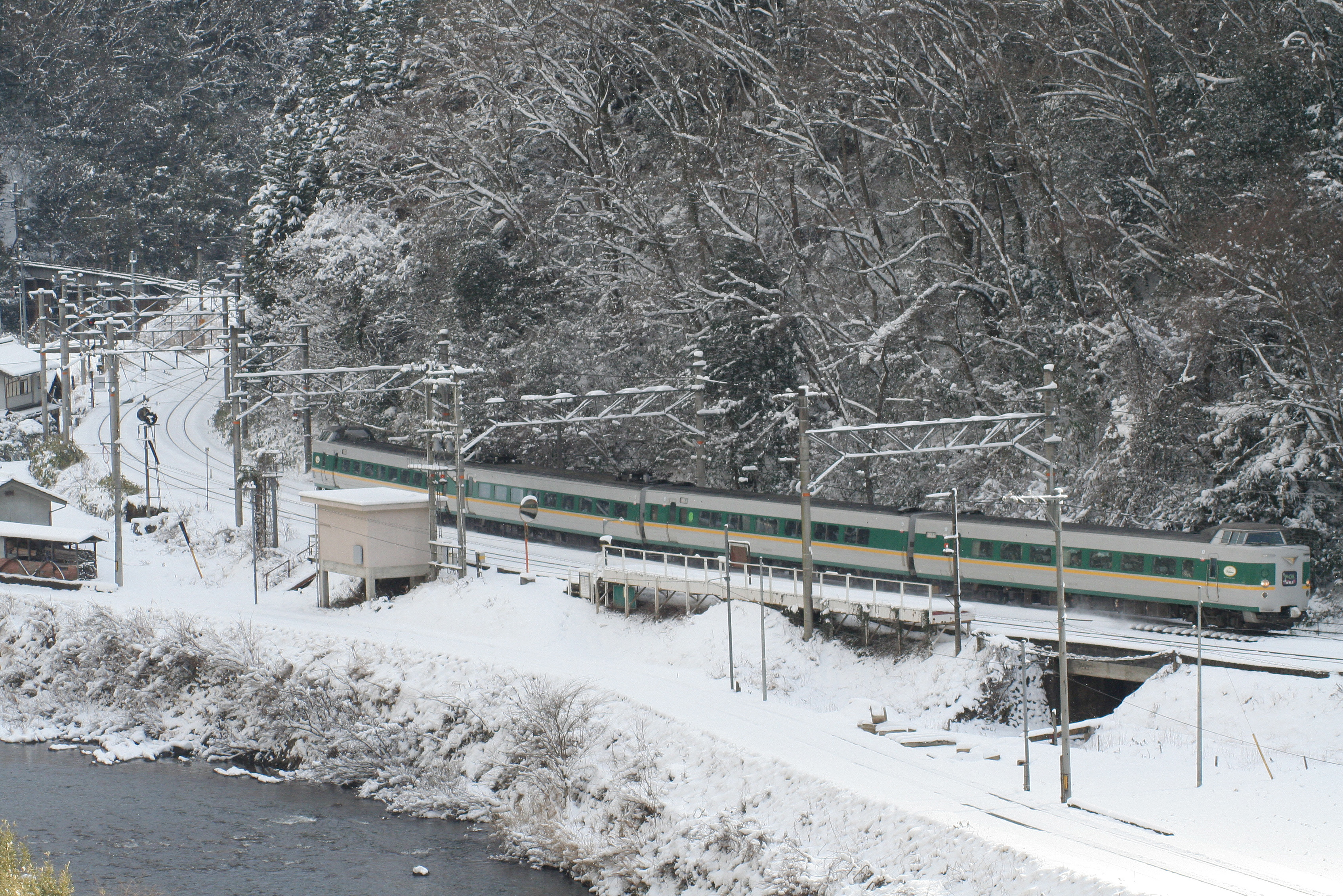 西日本旅客鉄道 伯備線、布原駅を通過する381系電車、特急「やくも」